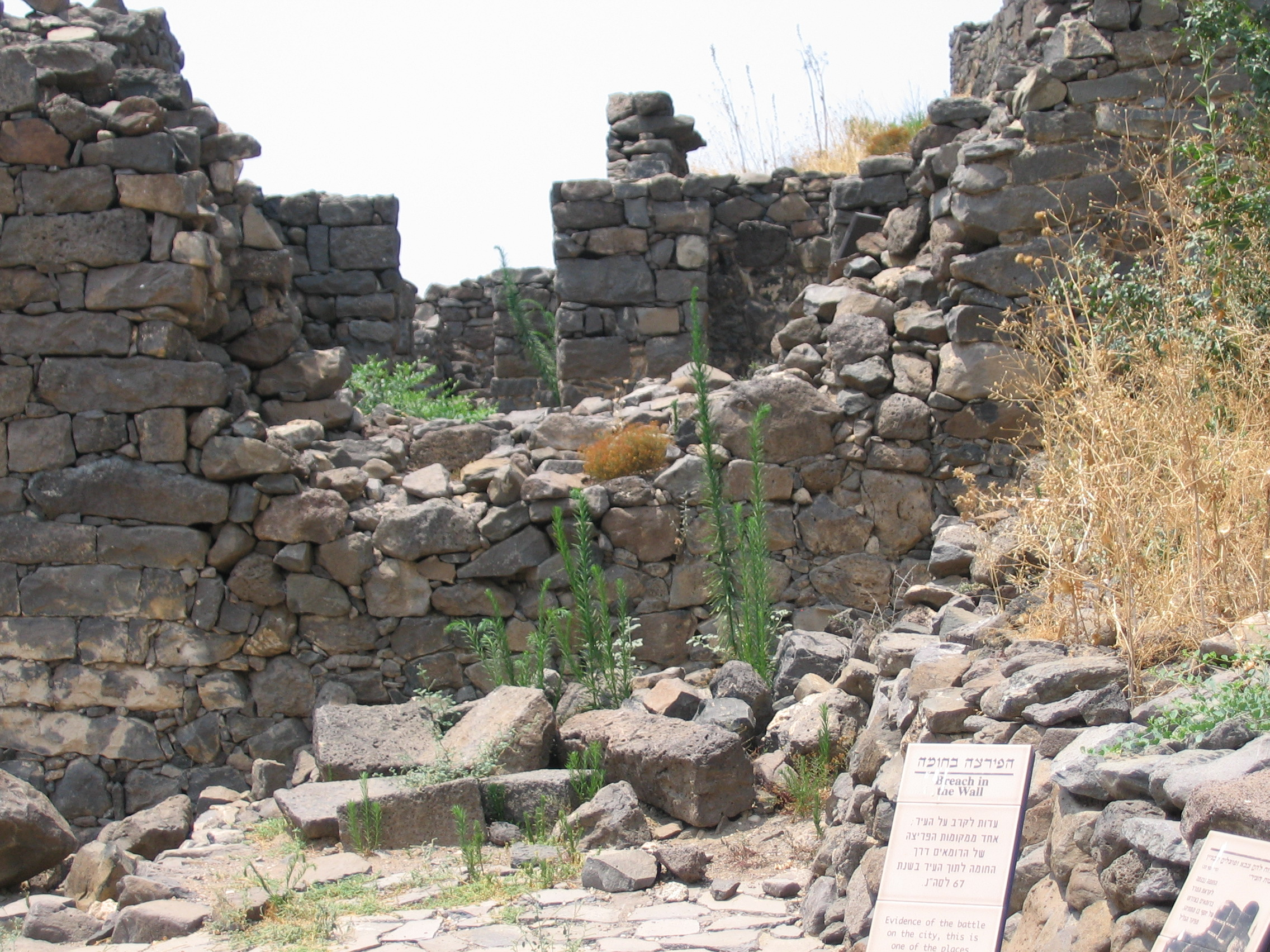 הפירצה בחומה דרכה חדרו הרומאים, לעיר גמלא הנצורה בשנת 67.